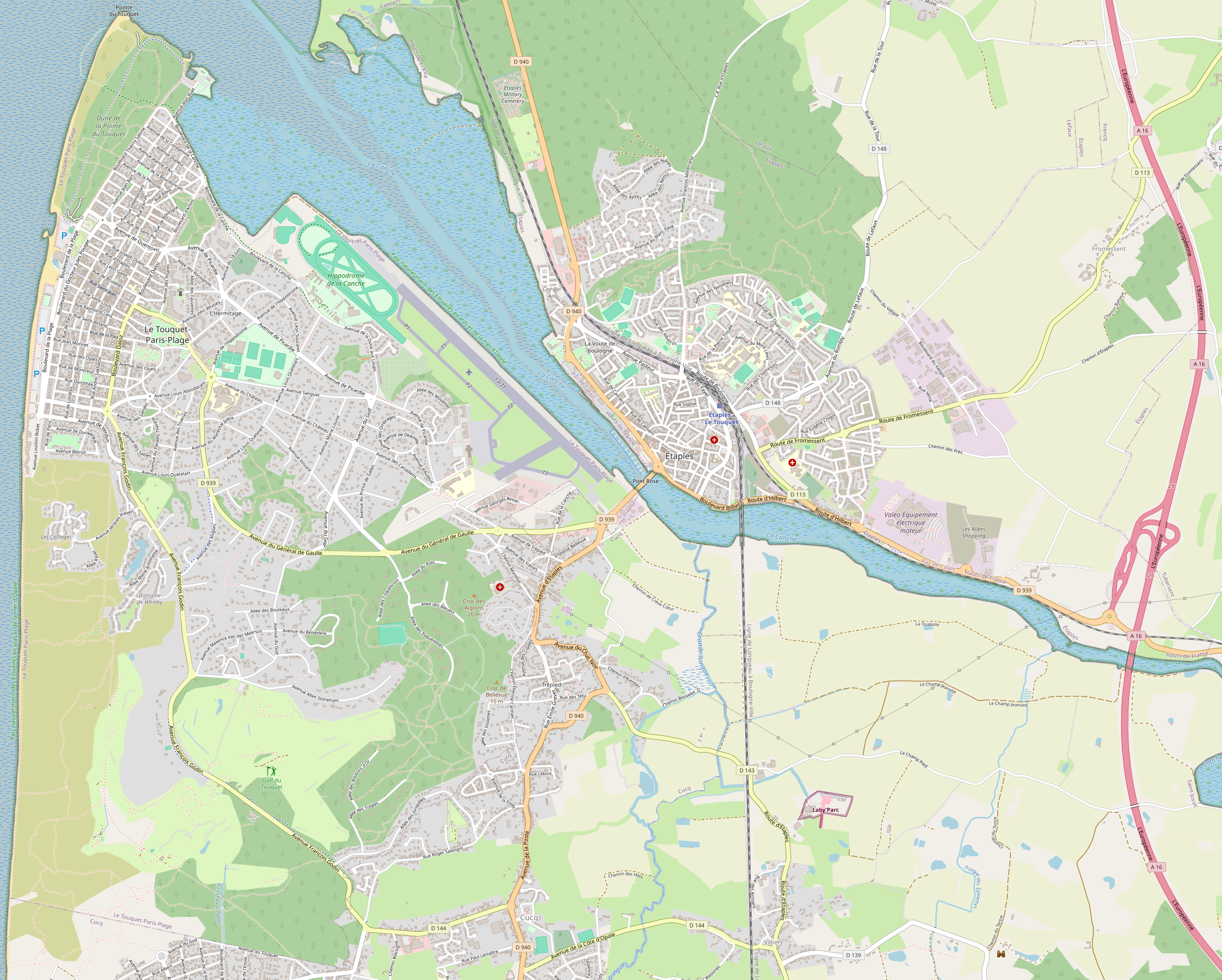 Le Touquet-paris-Plage (carte générale) - Voies de communication (routières et ferroviaire).